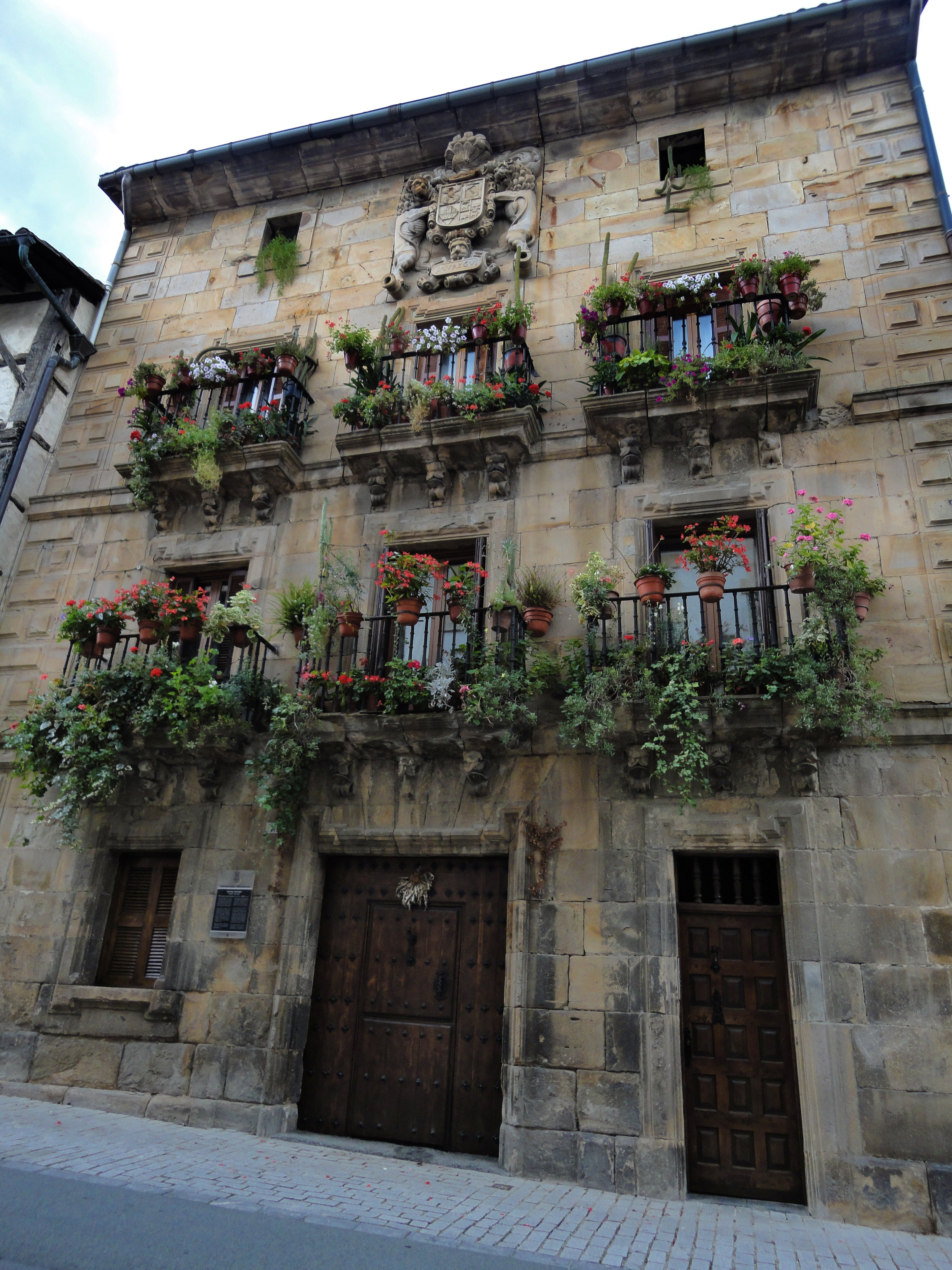 Jauregi jauregia - Segura